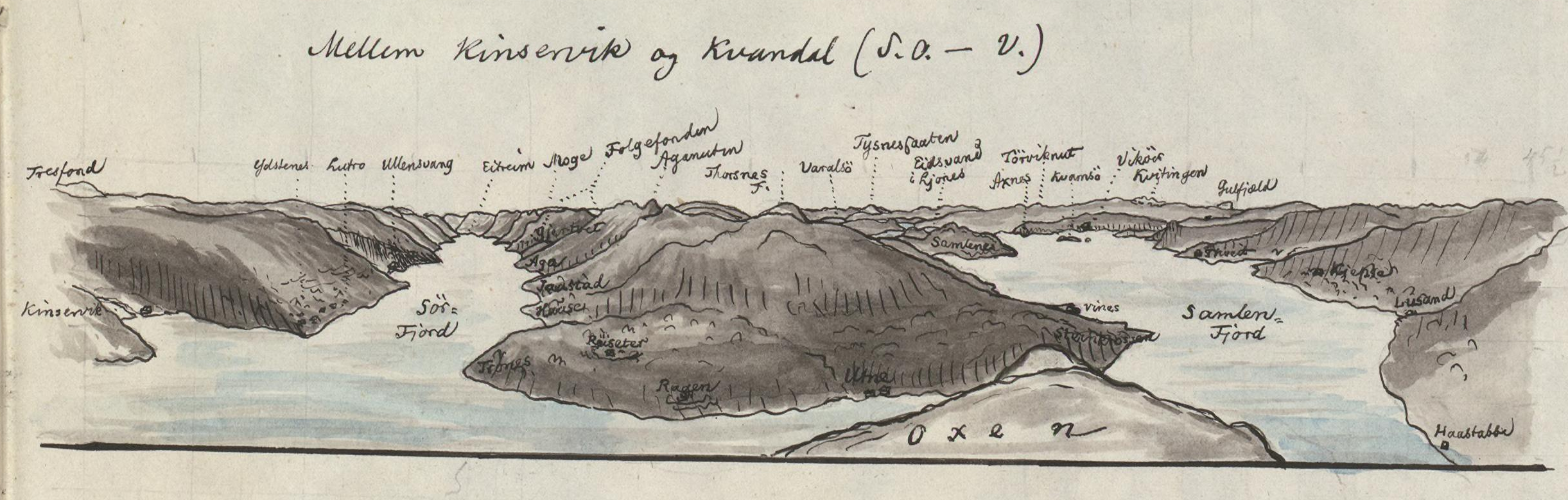 «Mellem Kinservik og Kvandal». Illustrasjon fra P. A. Munchs reiseinnberetning.